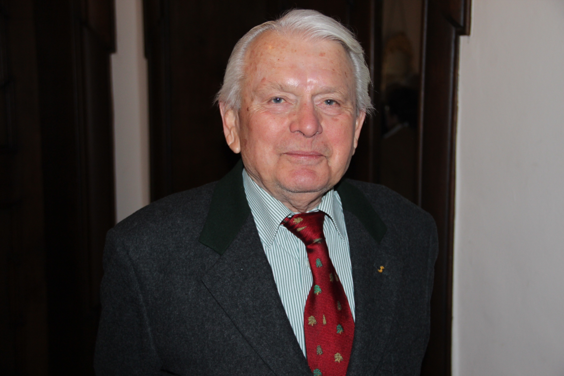 Wilfried Steuer in Wilflingen (2013)